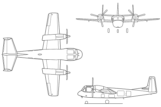 OV-1 Mohawk 3-view